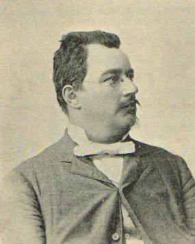 Eduard Formánek (1845 - 1900), Český botanik.